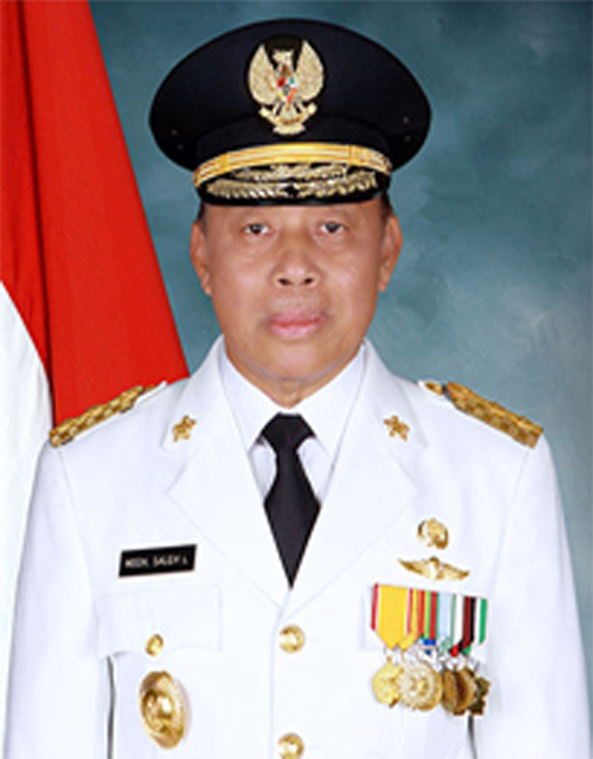 Saleh Lasata, Wakil Gubernur Sulawesi Tenggara